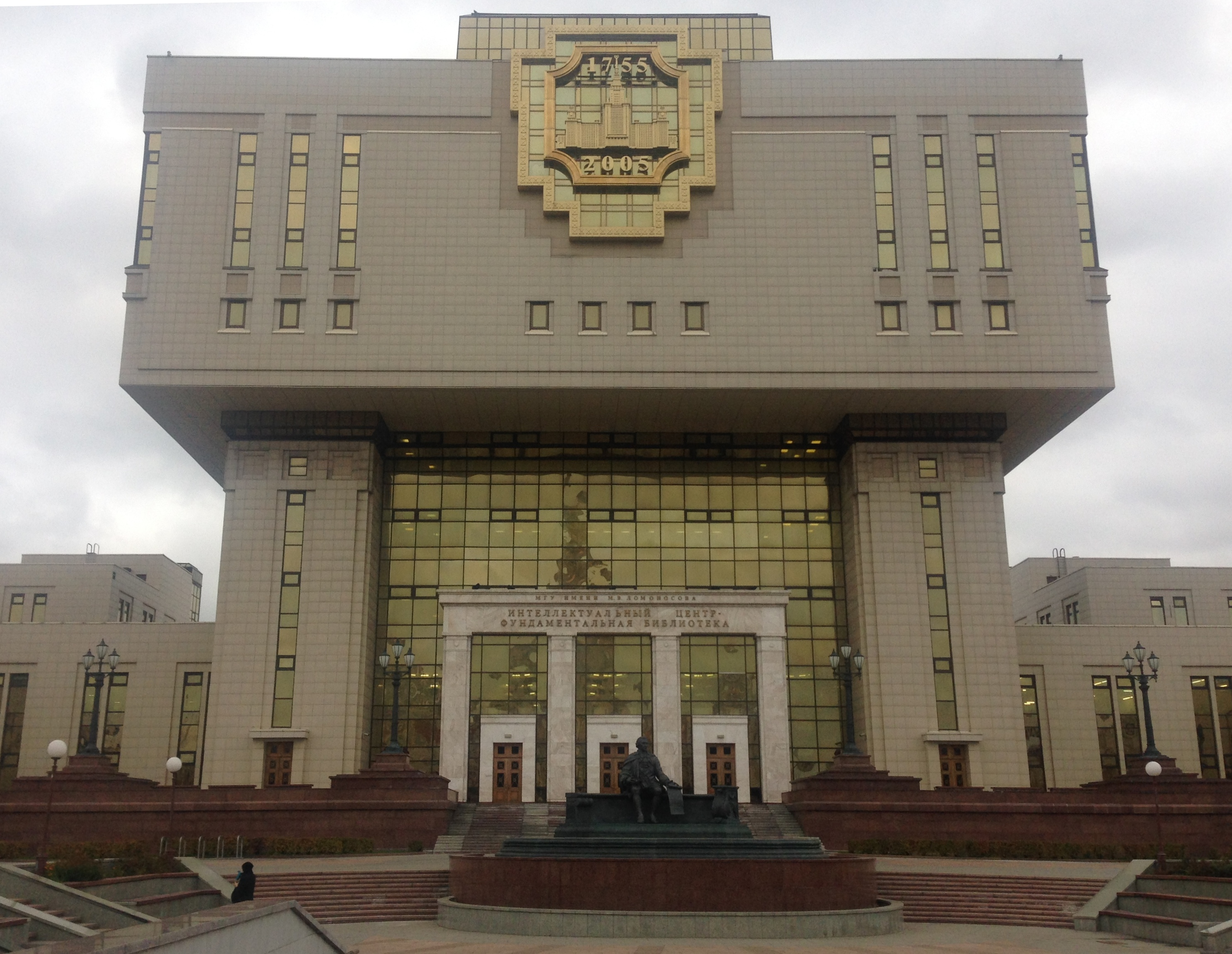 Здание научной библиотеки Московского университета